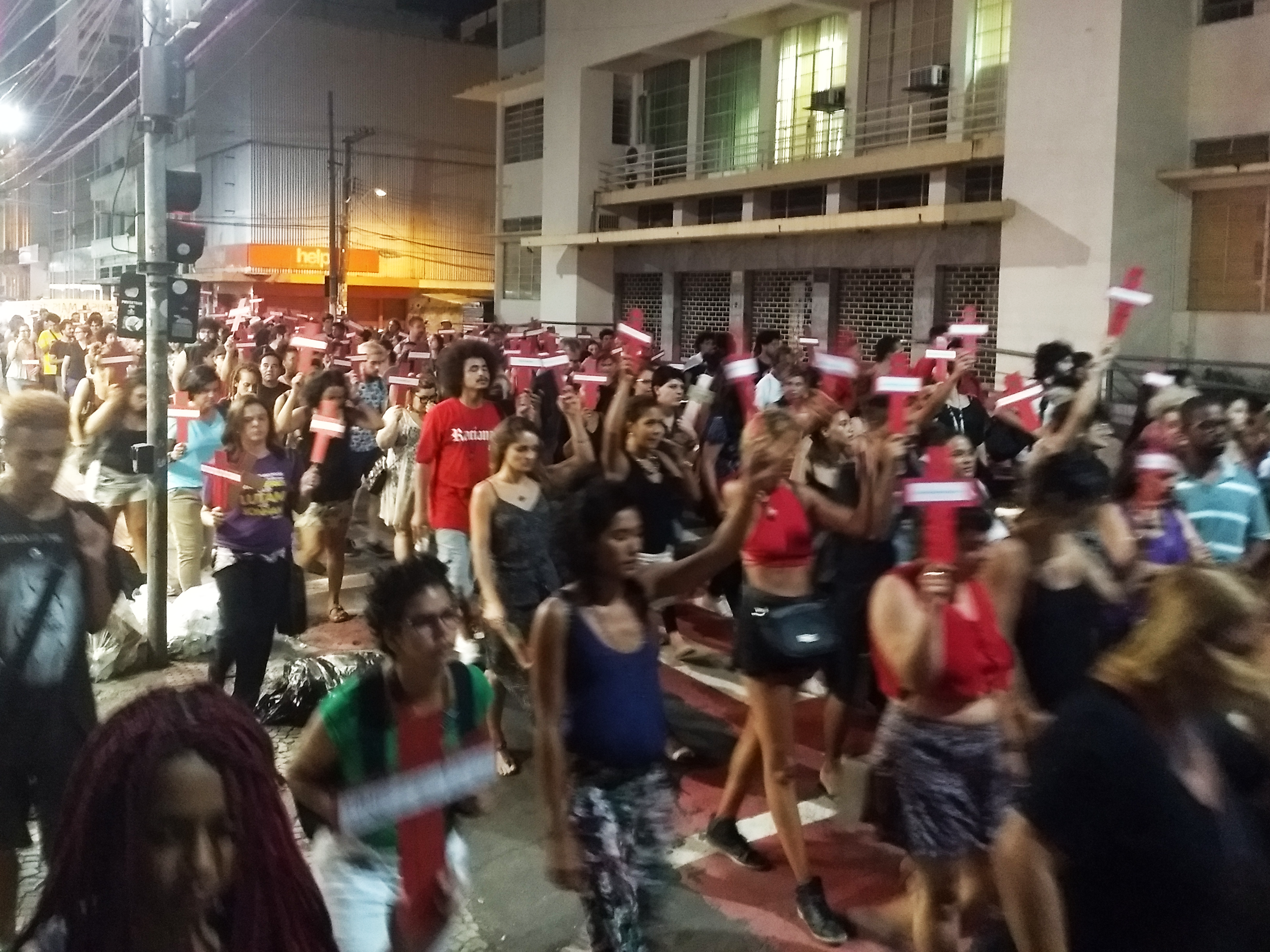 Passeata realizada na Avenida Jerônimo Monteiro, em Vitória, em homenagem a Marielle Franco e Anderson Pedro Gomes.